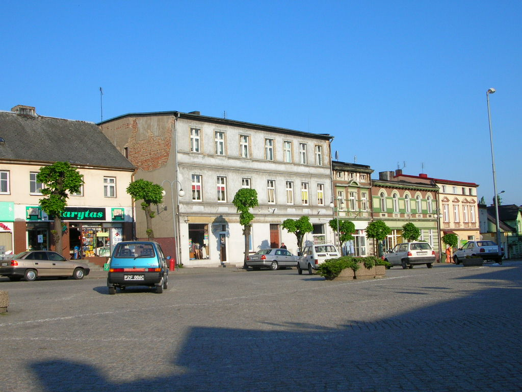 Wyrzysk - Rynek Autor - Bartek Wawraszko ( Bast )